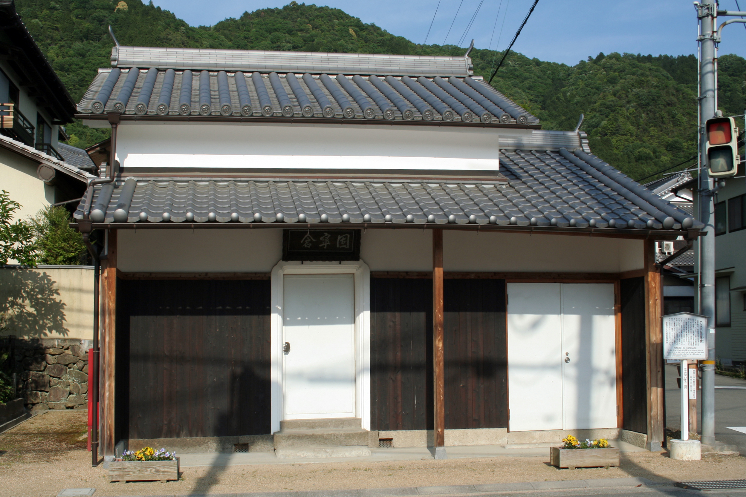 姫路市書写山の西側山麓の刀出にある固寧倉。